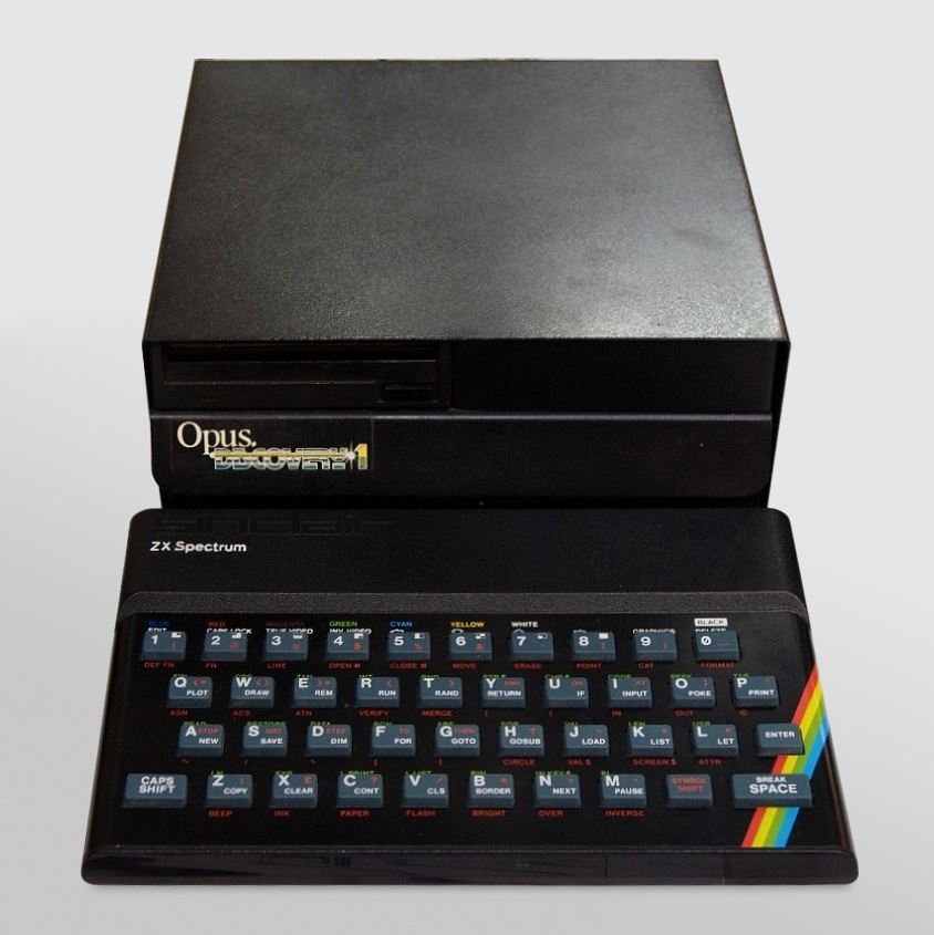 Opus Discovery attached to ZX Spectrum 48K. Cropped version of image Model: ZX Spectrum 48k Manufacture: Sinclair, UK Debut: 1982 Basic Info: CPU: Zilog Z80A @ 3.5 MHz MEMORY: 16-48kb RAM / 16kb ROM BUS: 8 bit GRAPHICS: max 256x192 (8 colors) SOUND: 1 voice / 10 octaves (Beeper) MEDIA: ext. Tape Recorder, ZX micro-drives Featured extras: Discovery Opus Drive 3.5" Presented by:Darth Cot...? “Sitting in front of the Opus Discovery-1, a box that offered a floppy drive controller and floppy drive (no more microdrives), serial and parallel ports, joystick ports, a monitor port, and probably other things I don't remember now, which made the Spectrum an actually viable computer.” —Soupmeister Tags: spectrum exhibit sinclair retrocomputing oldcomputers sinclairzxspectrum silogomaniacom collectingcomputers opusdiscovery1 retrosystem2010 Retrosystems 2010 This retro-computing (and gaming) exhibit on the 4th and 5th of December, 2010, was organised by a forum of collectors, and displayed a number of the Classics.